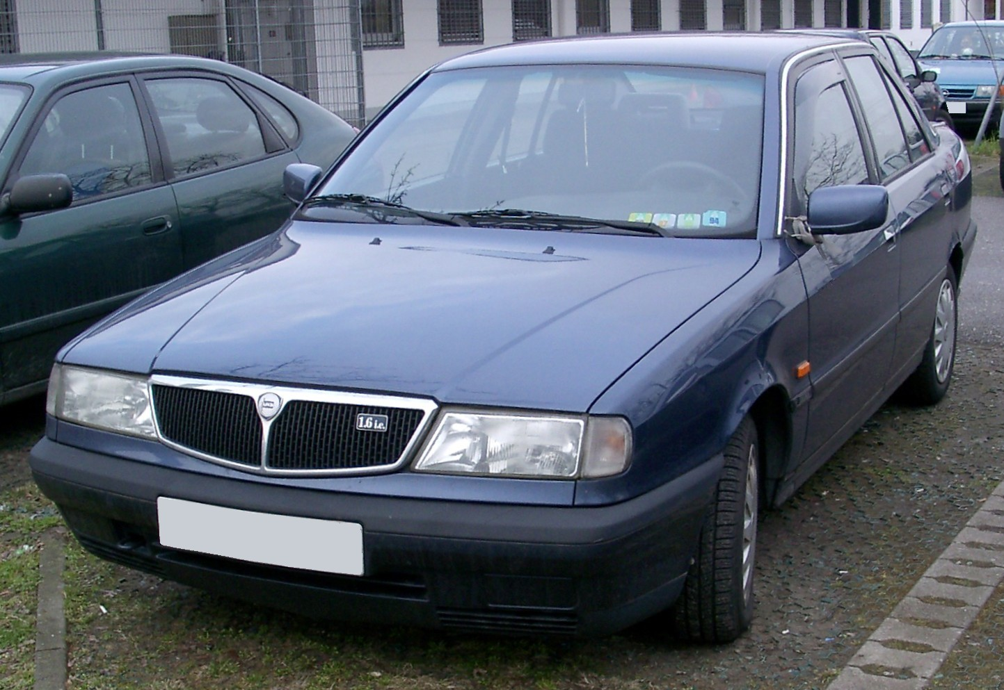 Lancia Dedra